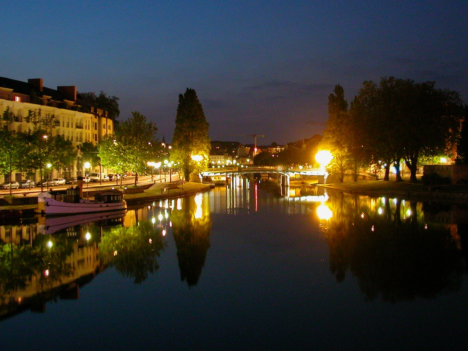 Bords de l'Erdre à Nantes de nuit : vue sur le pont Saint-Mihiel